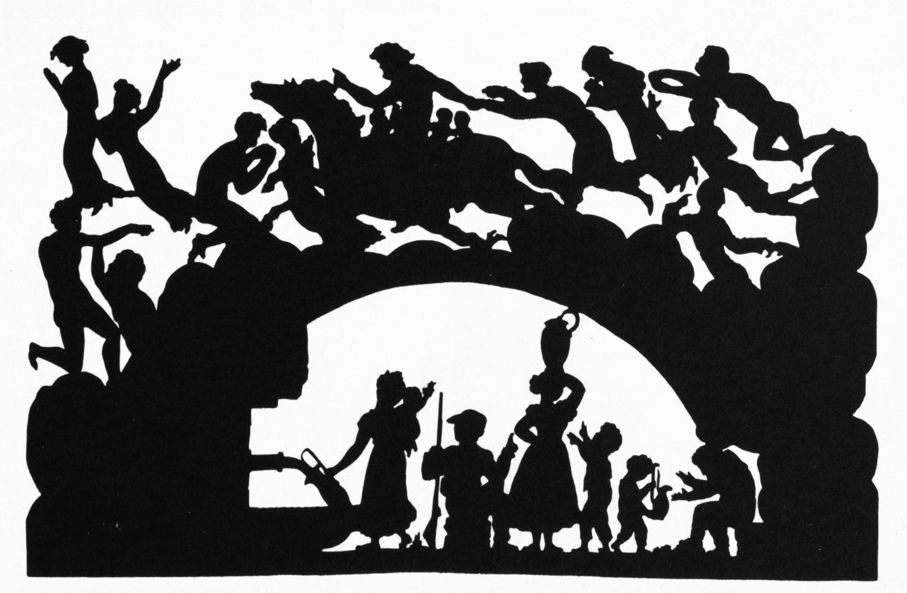 Luise Duttenhofer: Illustration zu Goethes Gedicht „Charon“, schwarzer Scherenschnitt, 13,1 x 20,4 cm, Entstehungsjahr 1824, Marbach, Deutsches Literaturarchiv, Inventarnummer 5639.